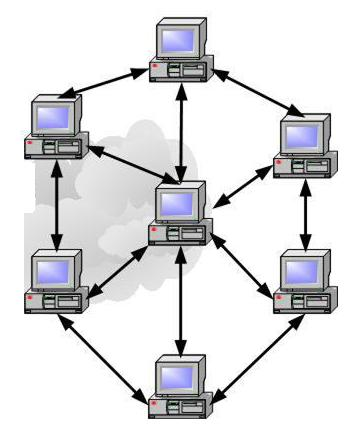 petit schéma de réseau informatique symbolisant Internet.